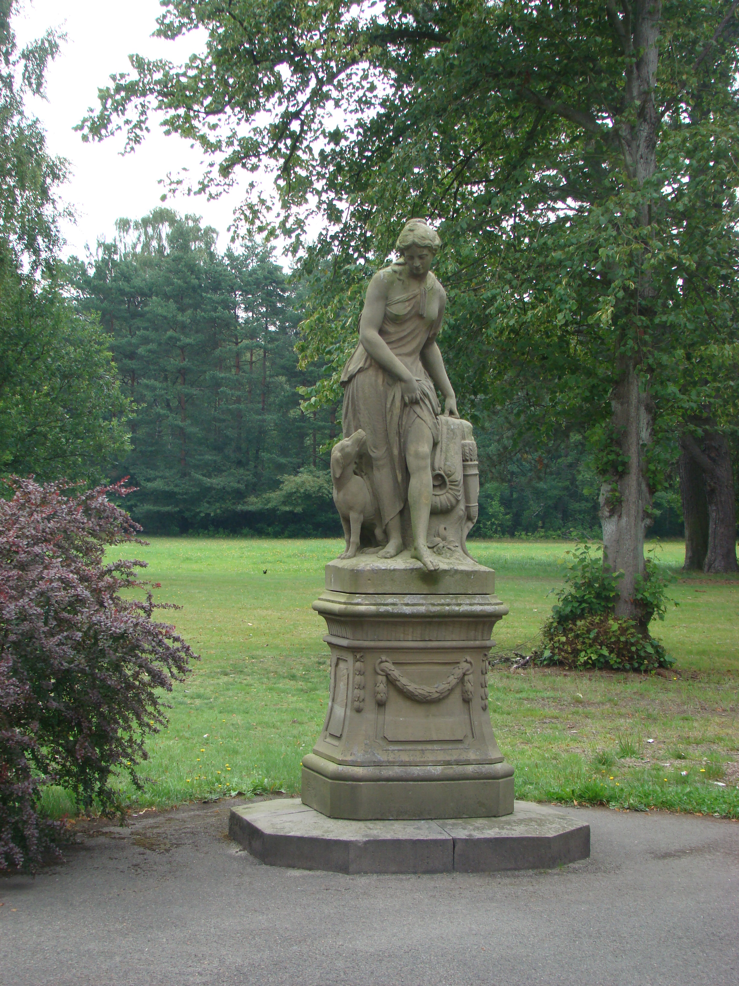 Jagdgöttin Diana mit Hund, auf einem Postament im Garten des Schlosses Bredebeck